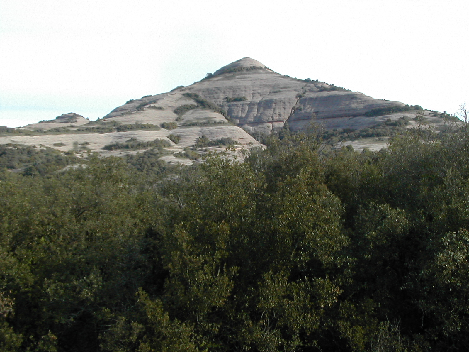 el Montcau a Sant Llorenç de Munt Author:David Gaya